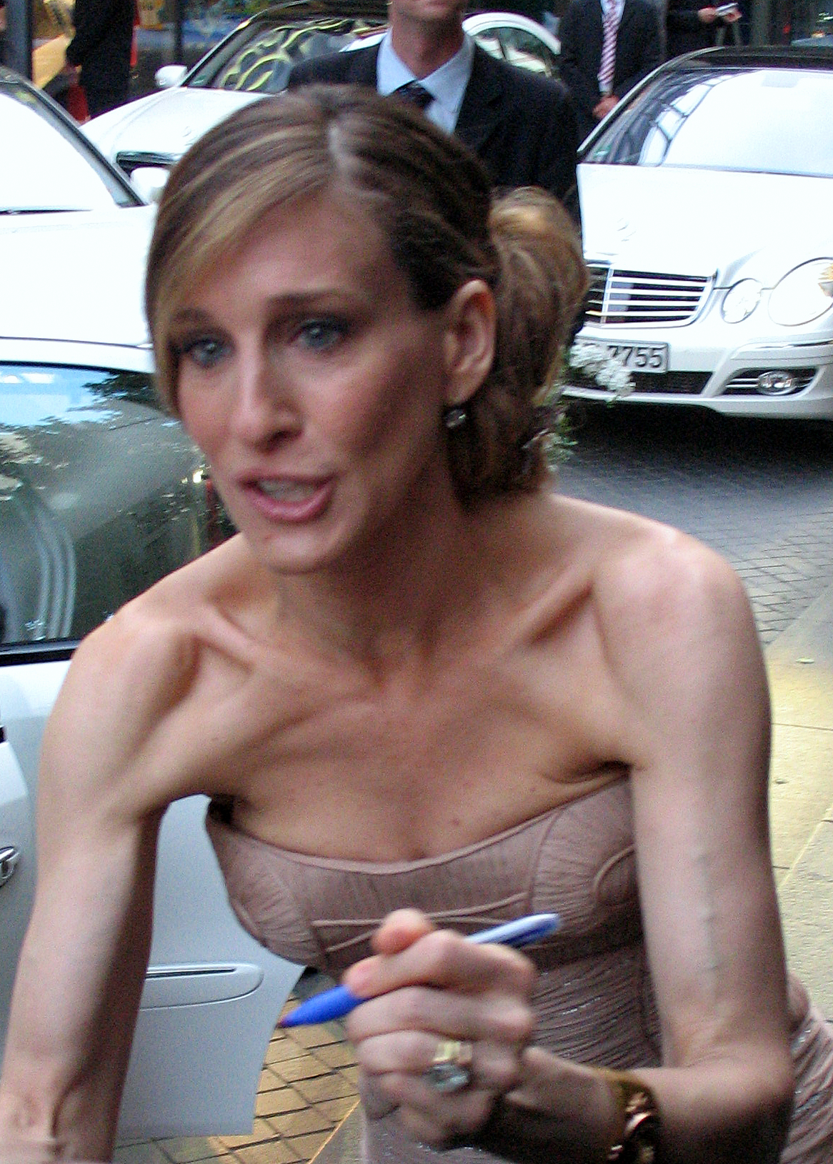 Sarah Jessica Parker bei der Premiere von Sex and The City Berlin, 15. Mai 2008